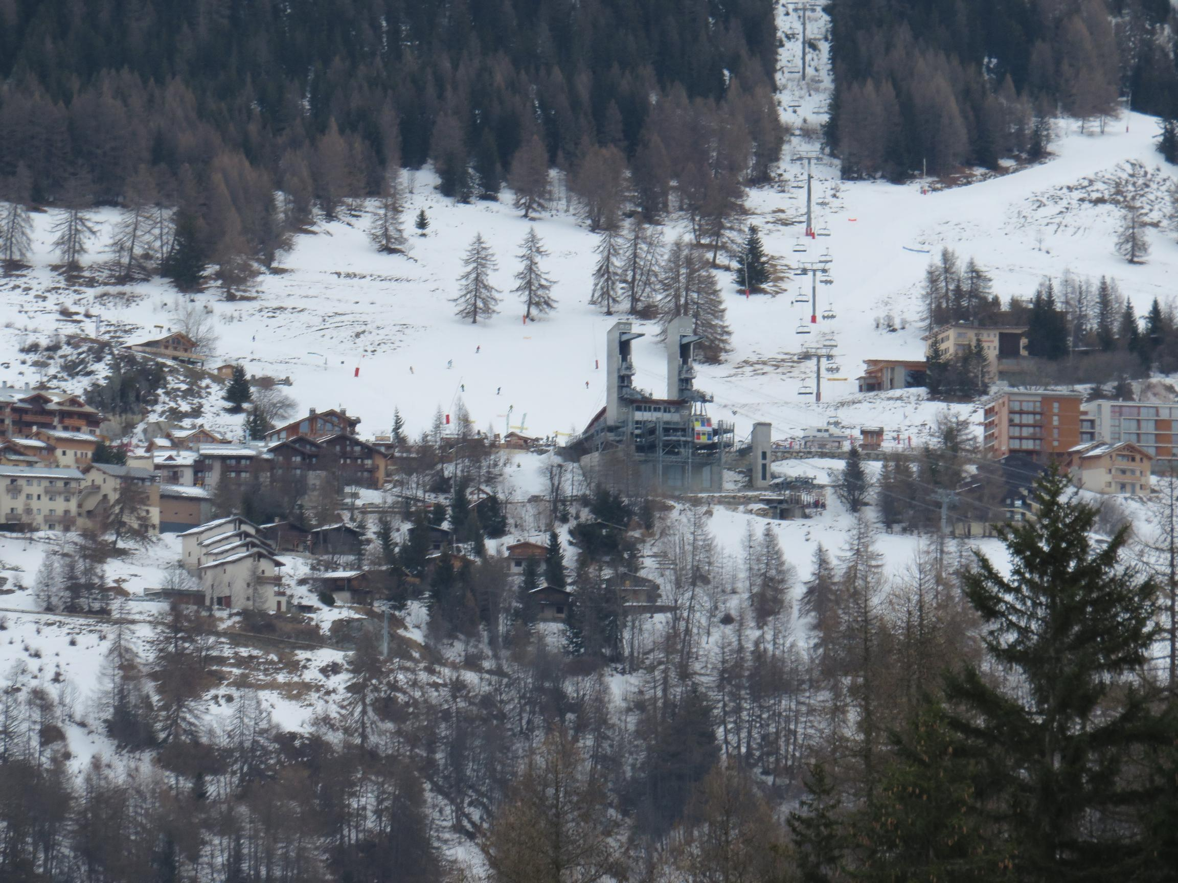 Peisey -Vallandry